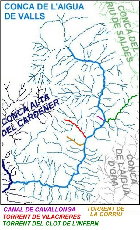 Mapa de la conca de l'Aigua de Valls (afluent del Cardener) en el qual s'hi han destacat els següents afluents: la Canal de Cavallonga, el Riu de Bonner, el Torrent de Vilacireres i el Torrent de la Corriu.